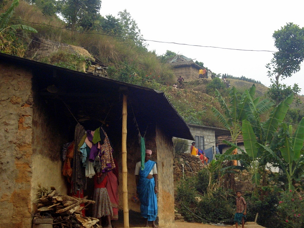 ഇടുക്കി ജില്ലയിലെ രാജകുമാരി എന്ന സ്ഥലത്തെ മുതുവാൻ ഗോത്രക്കാരുടെ കുടില്